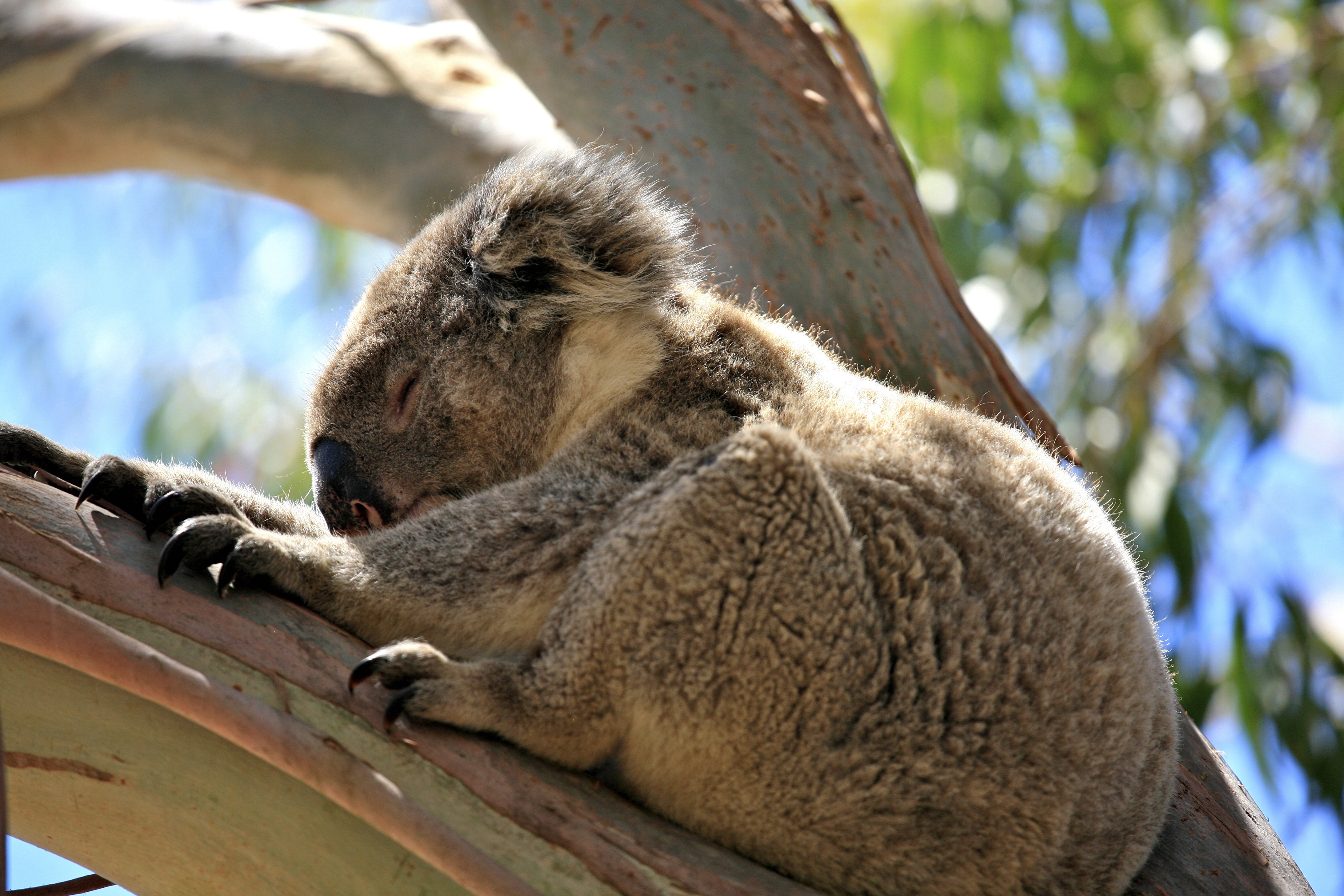 Baby Koala, Adult Claws